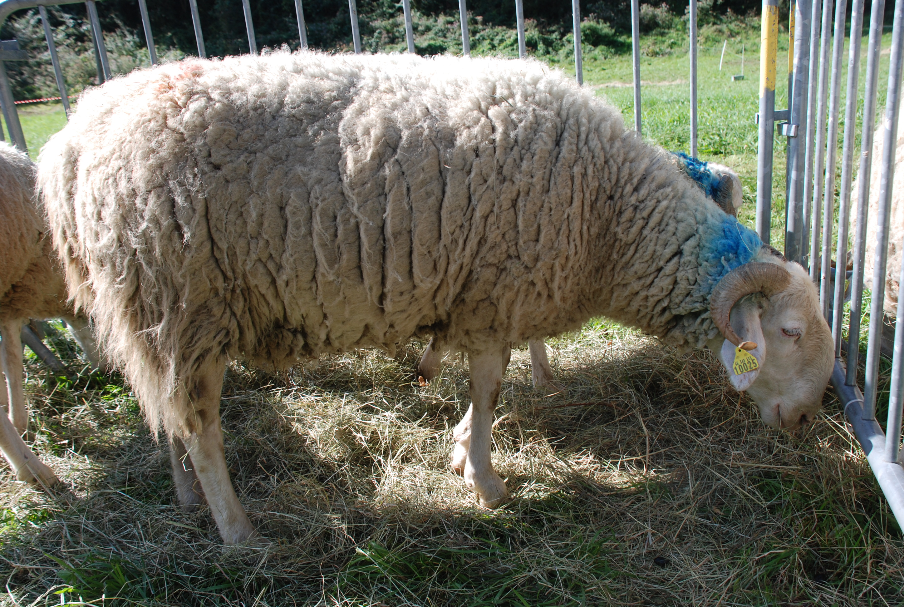 Sujet de la race ovine Lourdaise photographié le 06 septembre 2015 lors de la fête de la vache et de la brebis lourdaises à Aspin en Lavedan, Hautes-Pyrénées